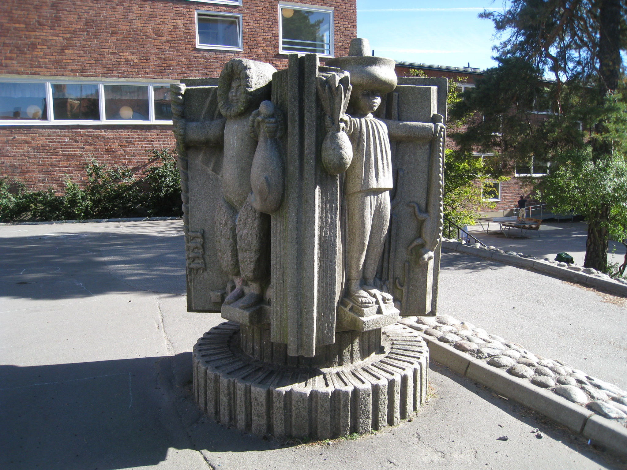 "Öst är öst och väst är väst", skulptur i granit av skulptören Robert Nilsson (1894-1980), rest 1945 vid Alviksskolan i Bromma, Stockholm. Skulpturen står på skolans östra gård utanför entré C2, Tranebergsvägen 73.